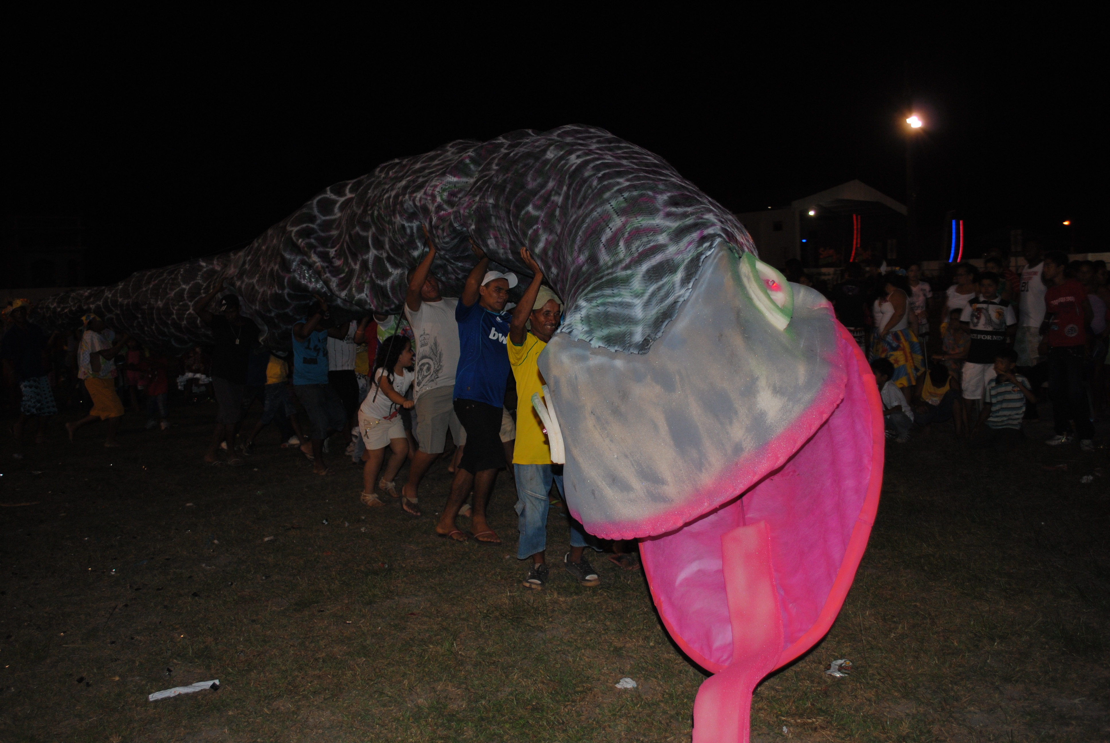 vor